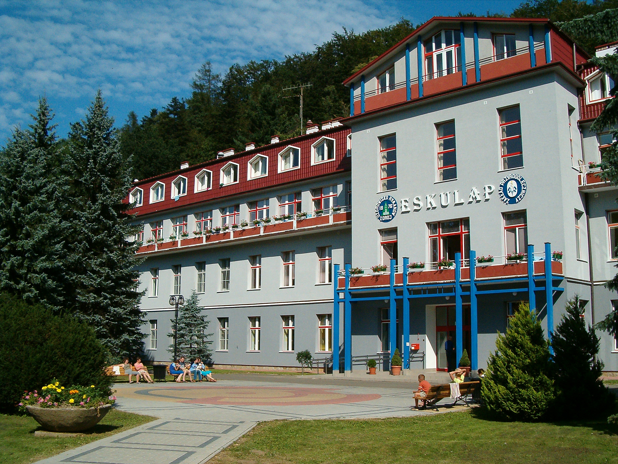 Rymanów-Zdrój, ul. Parkowa 5 - "Eskulap", szpital i sanatorium uzdrowiskowe